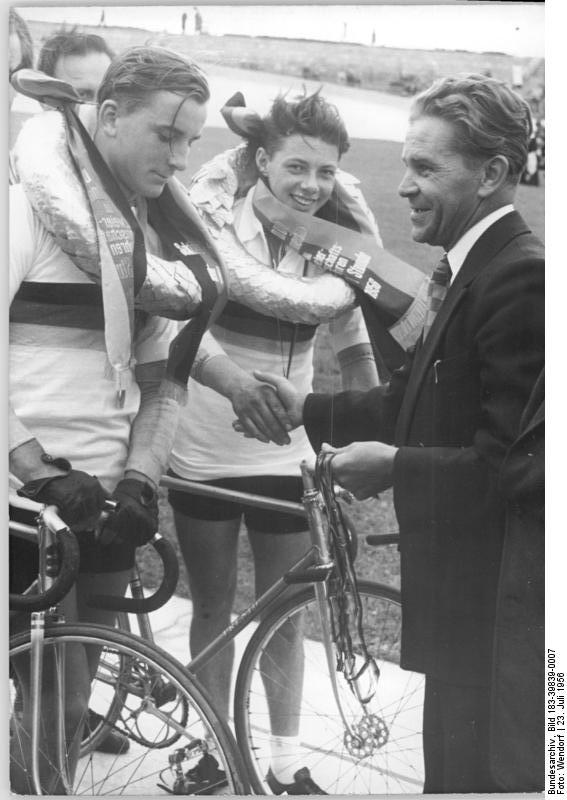 Uhlig, Graf, Werner Scharch Zentralbild Wendorf 23.7.1956 DDR-Meisterschaften der Bahnfahrer in Berlin-Weissensee Vom 22.7. bis 28.7.1956 finden auf der Radrennbahn in Berlin-Weissensee die Meisterschaften der Deutschen Demokratischen Republik im Bahnfahren statt. Zum ersten Male haben die Radsportfreunde damit Gelegenheit, die Bahnmeisterschaften in Berlin mitzuerleben. UBz: Der Präsident der Sektion Radsport der DDR Werner Scharch zeichnet die neuen Meister im Zweier-Mannschaftsfahren der Jugend Uhlig (links) und Graf (Mitte) aus.